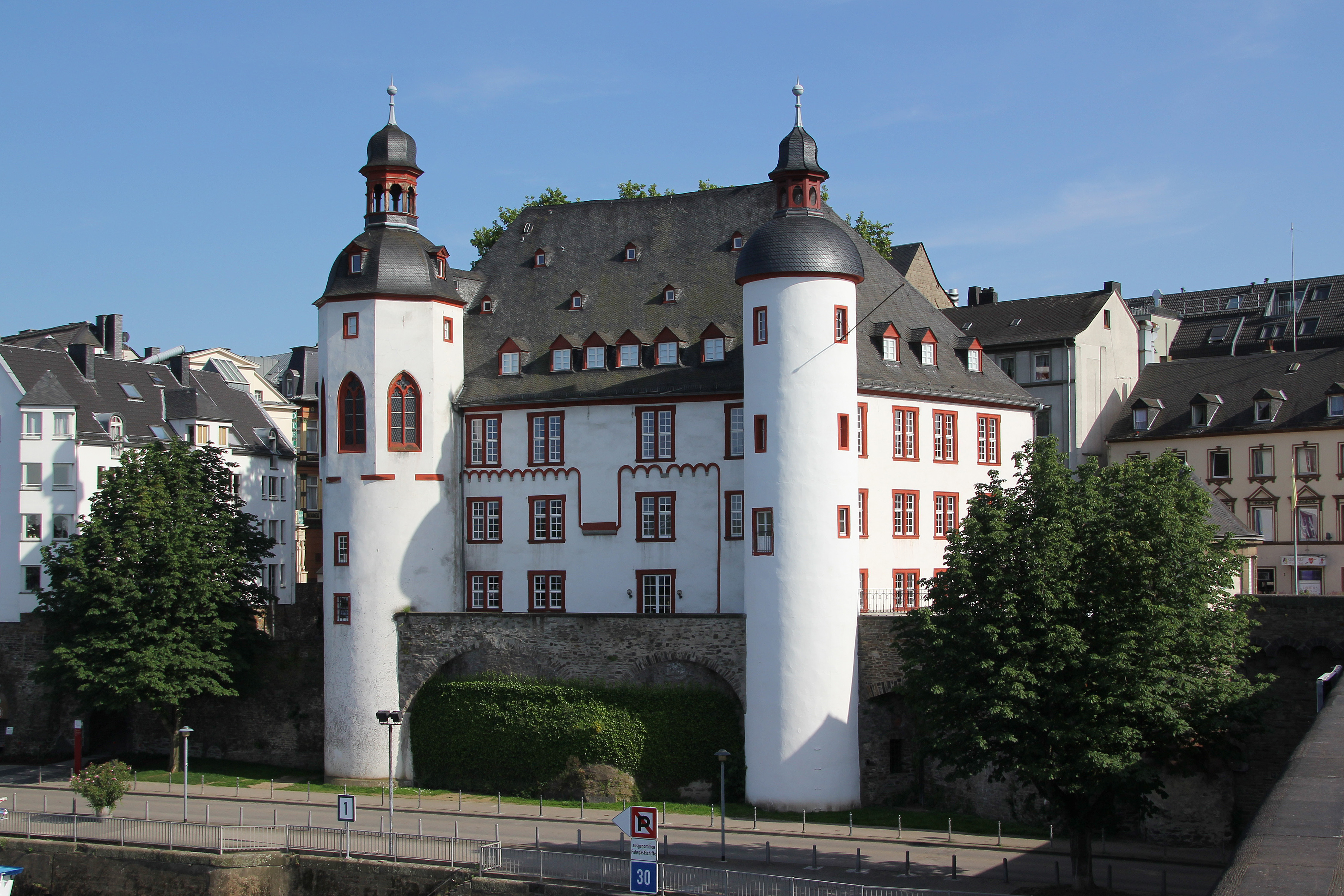 Koblenz im Buga-Jahr 2011 - Die Alte Burg